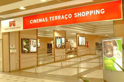 Cinema Severiano Ribeiro instalado no Terraço Shopping de Brasília, DF exibindo a logo antiga da empresa